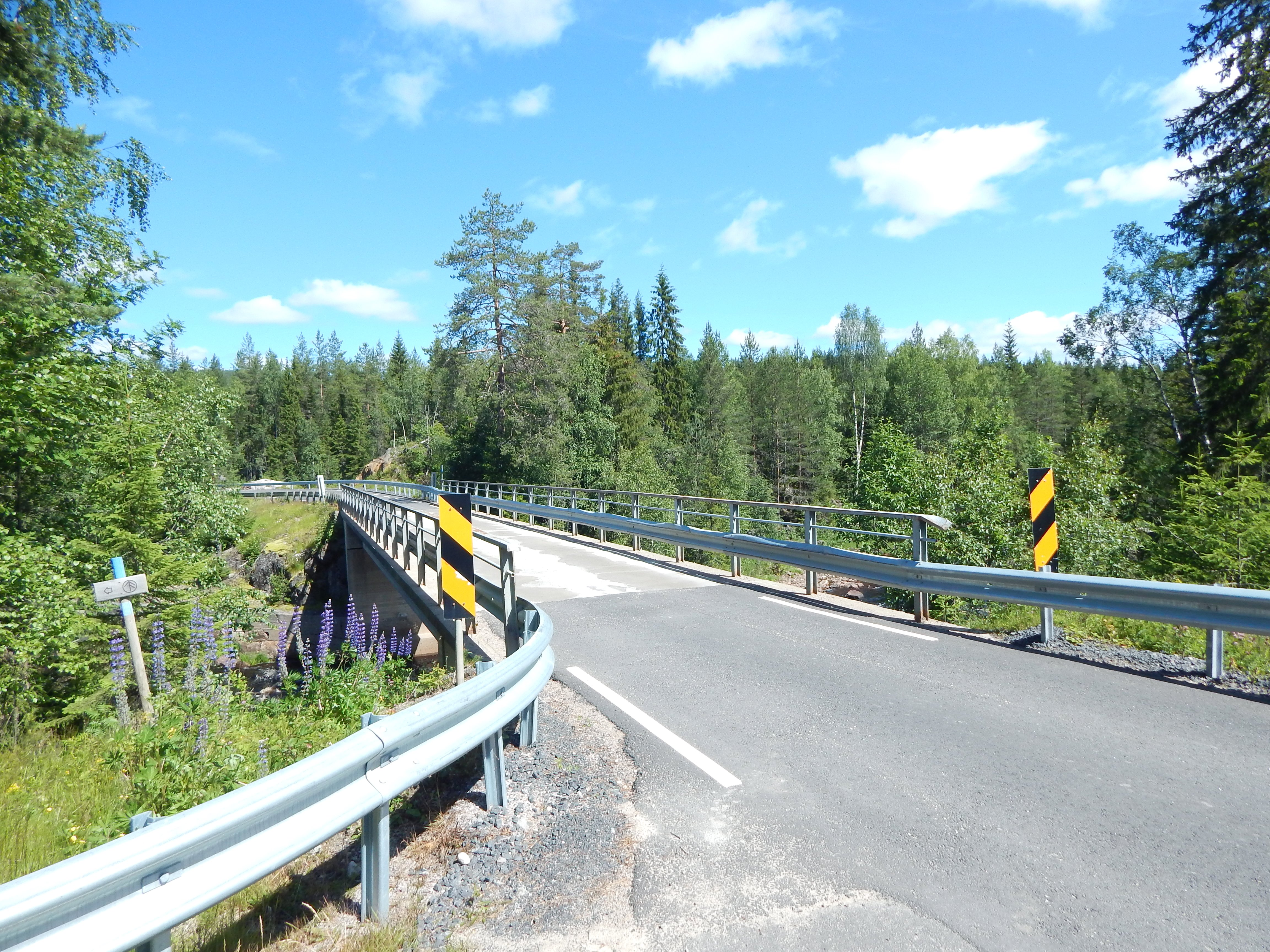 Fylkesvei 491 krysser Bølåa mellom Nordre og Søndre Bølsjøen.